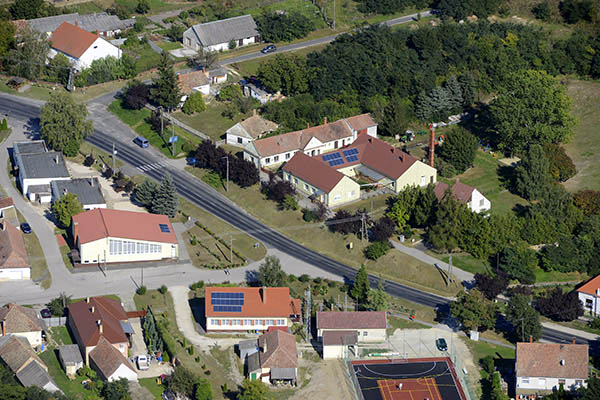 Nyárád légi fotó